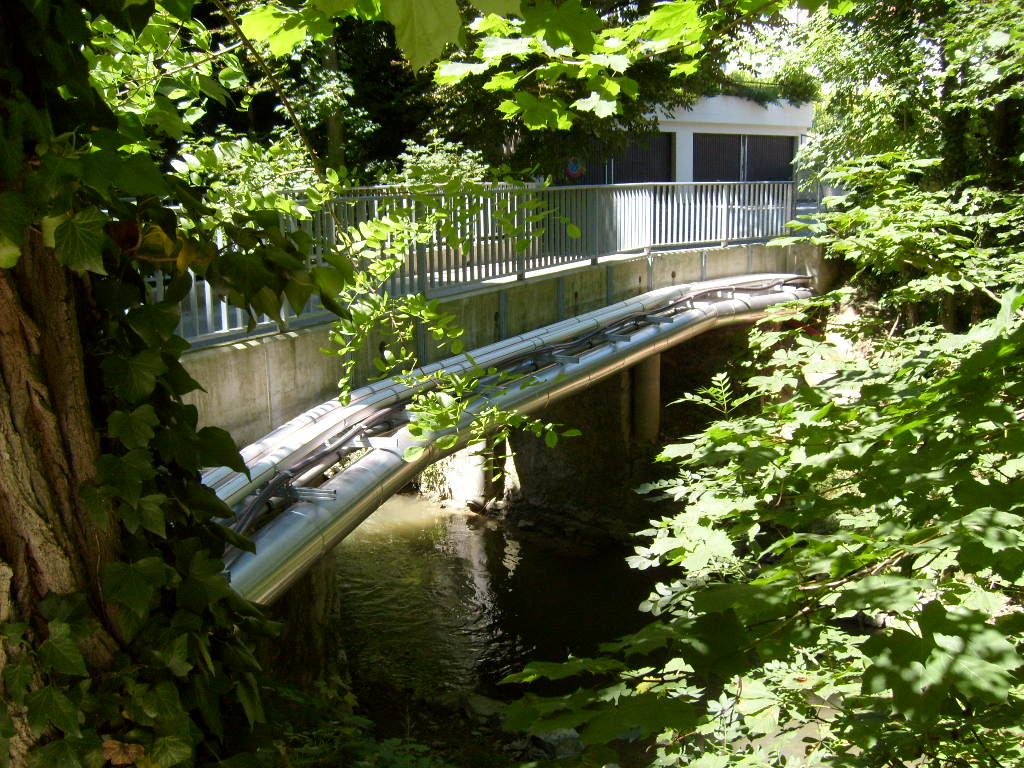 Pont sur le chemin de Sous-Bois à Lancy (Suisse)